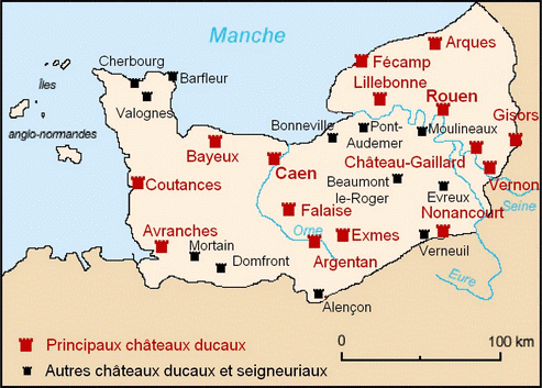 Carte des châteaux de Normandie au XIe-XIIe siècle